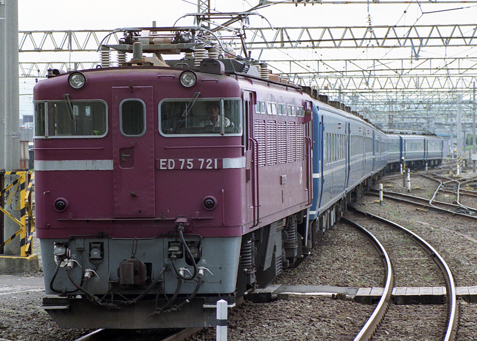 JR東日本 ED75 721けん引 急行 津軽 青森駅にて